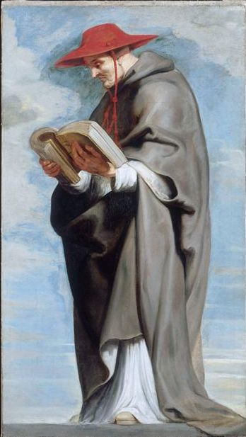 Saint Bonaventure.